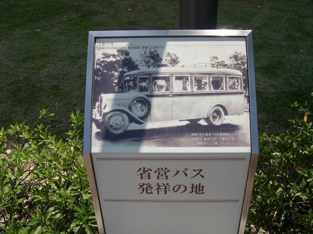 2006-9-2撮影